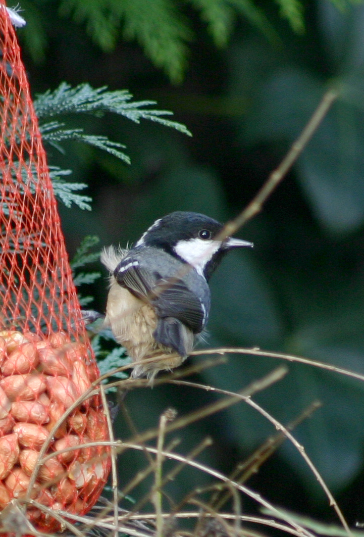 Periparus Ater